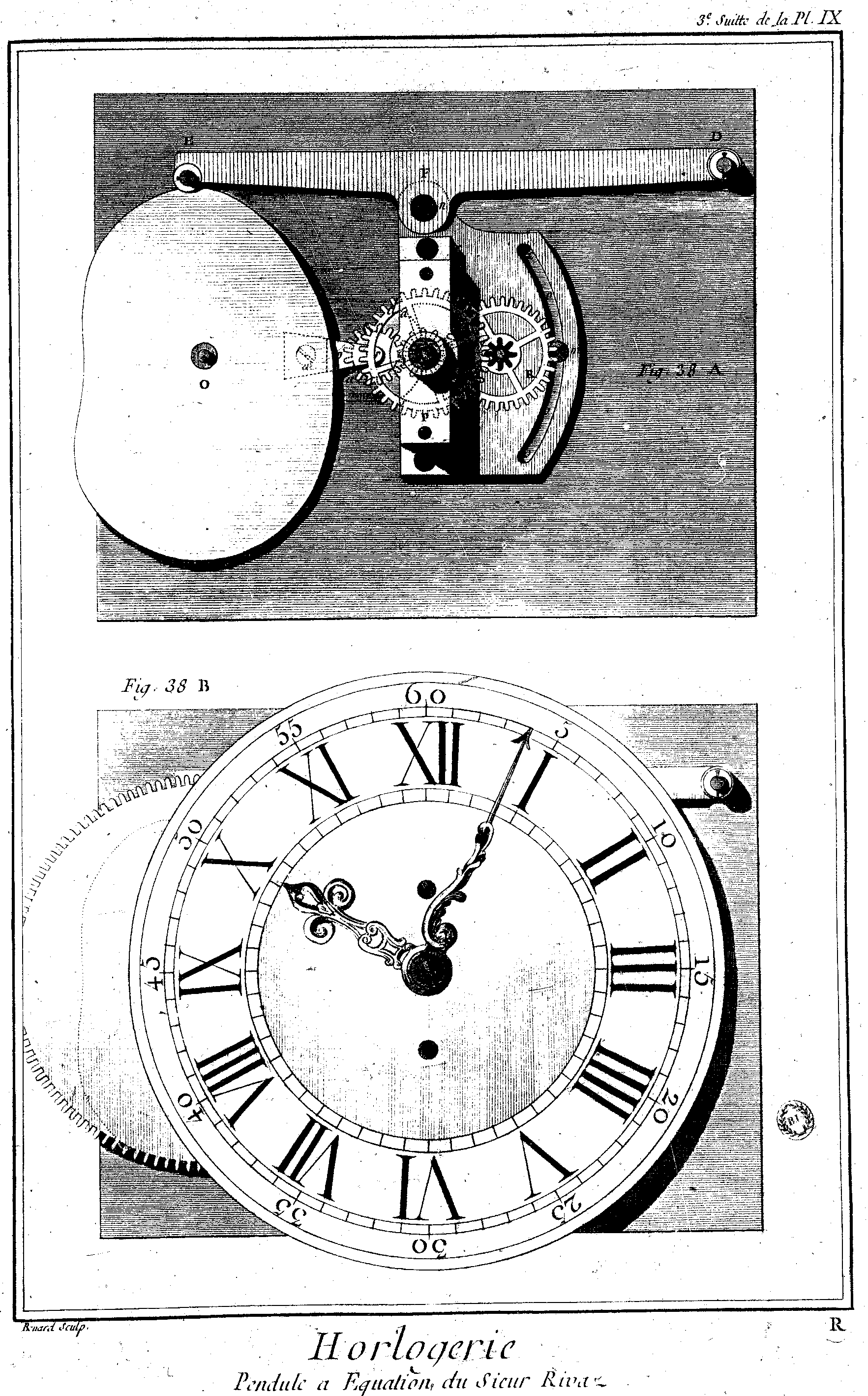 Planches de l'Encyclopédie de Diderot et d'Alembert, volume 3